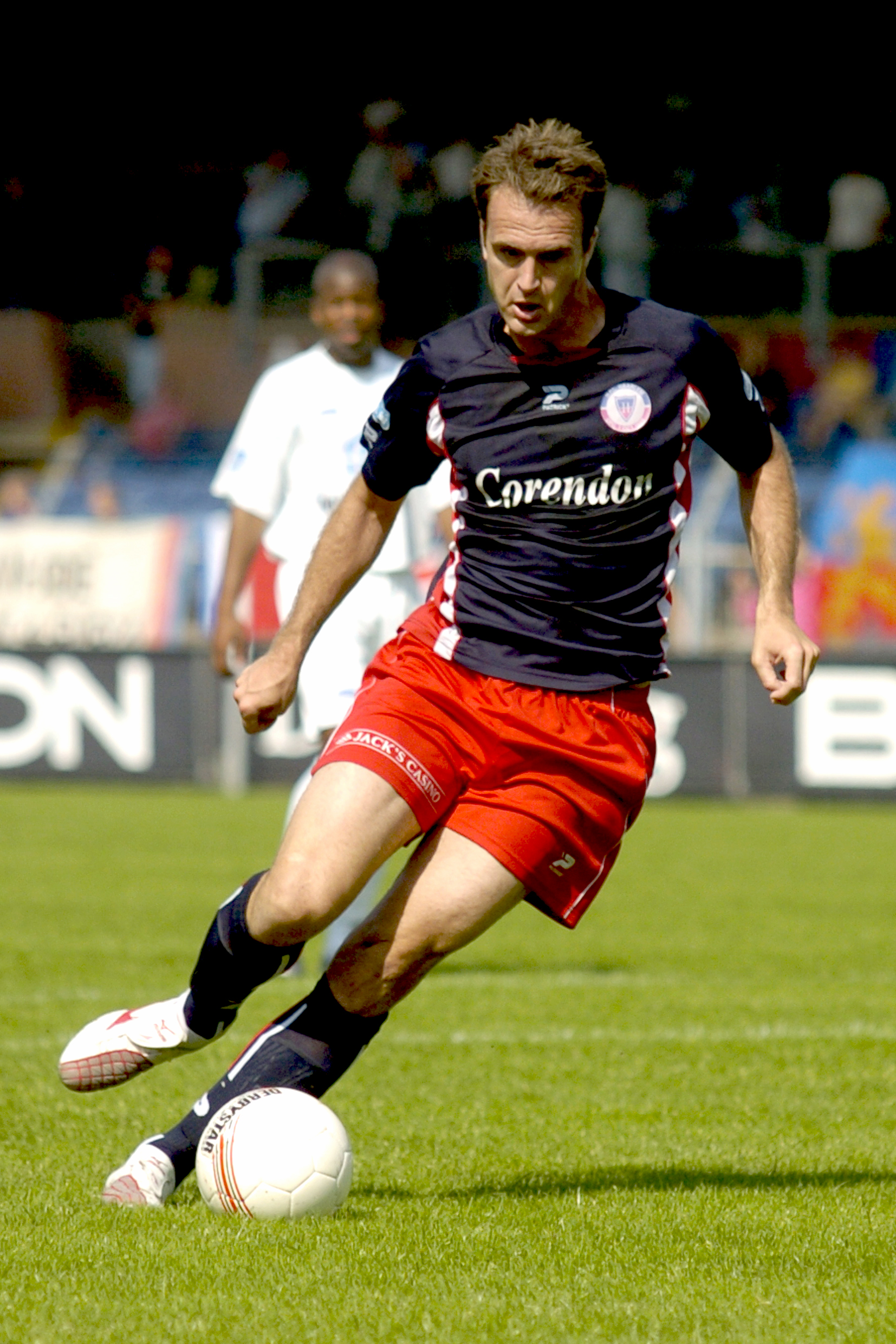 Laurens ten Heuvel op 31-8-2008 HFC Haarlem - SC Telstar 4-2